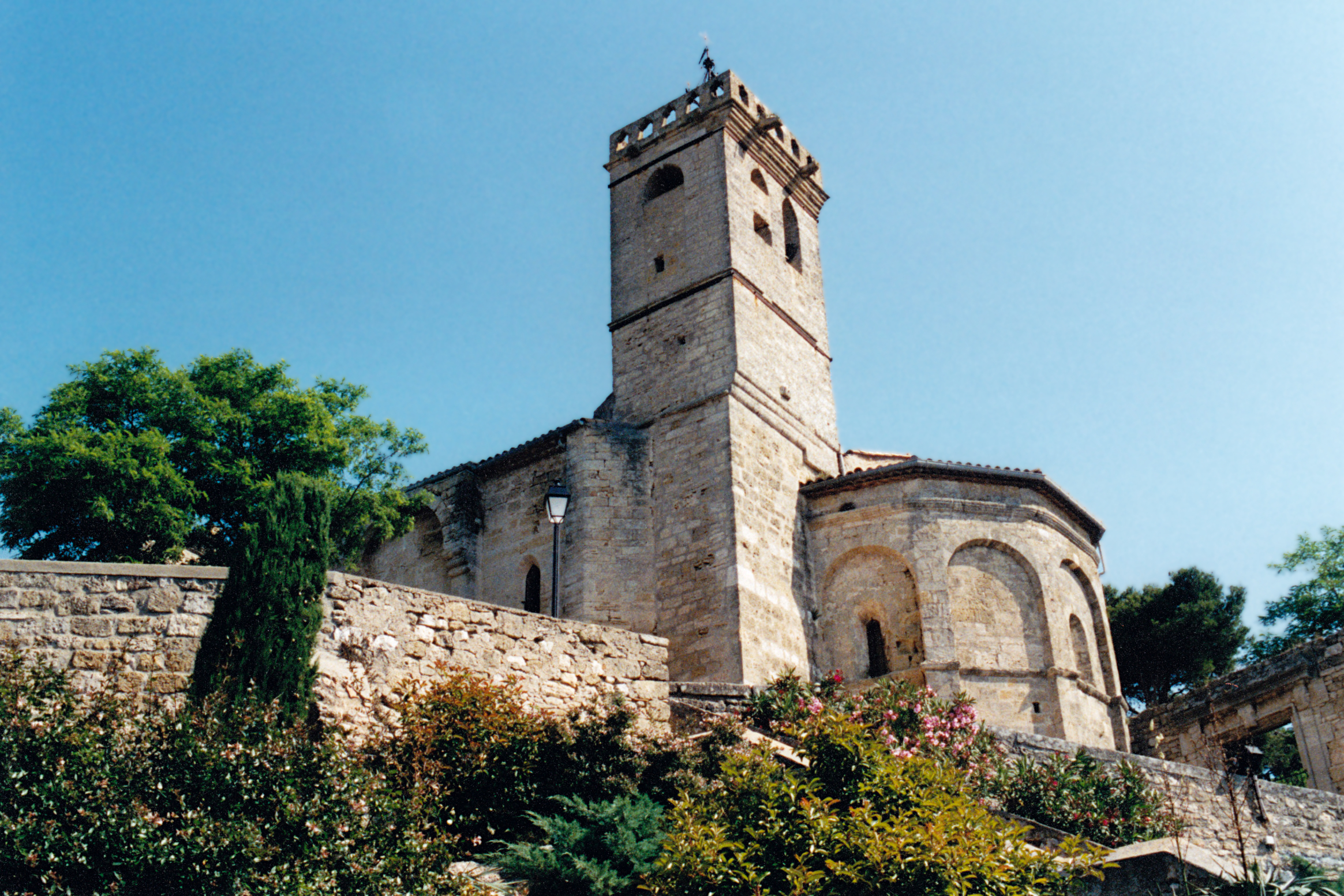 France - Languedoc - Hérault - Église de Saint-Pons-de-Mauchiens